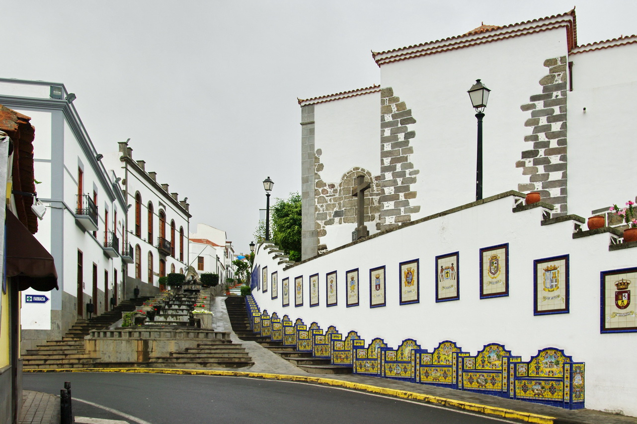 Wasser- und Azulejos-Boulevard